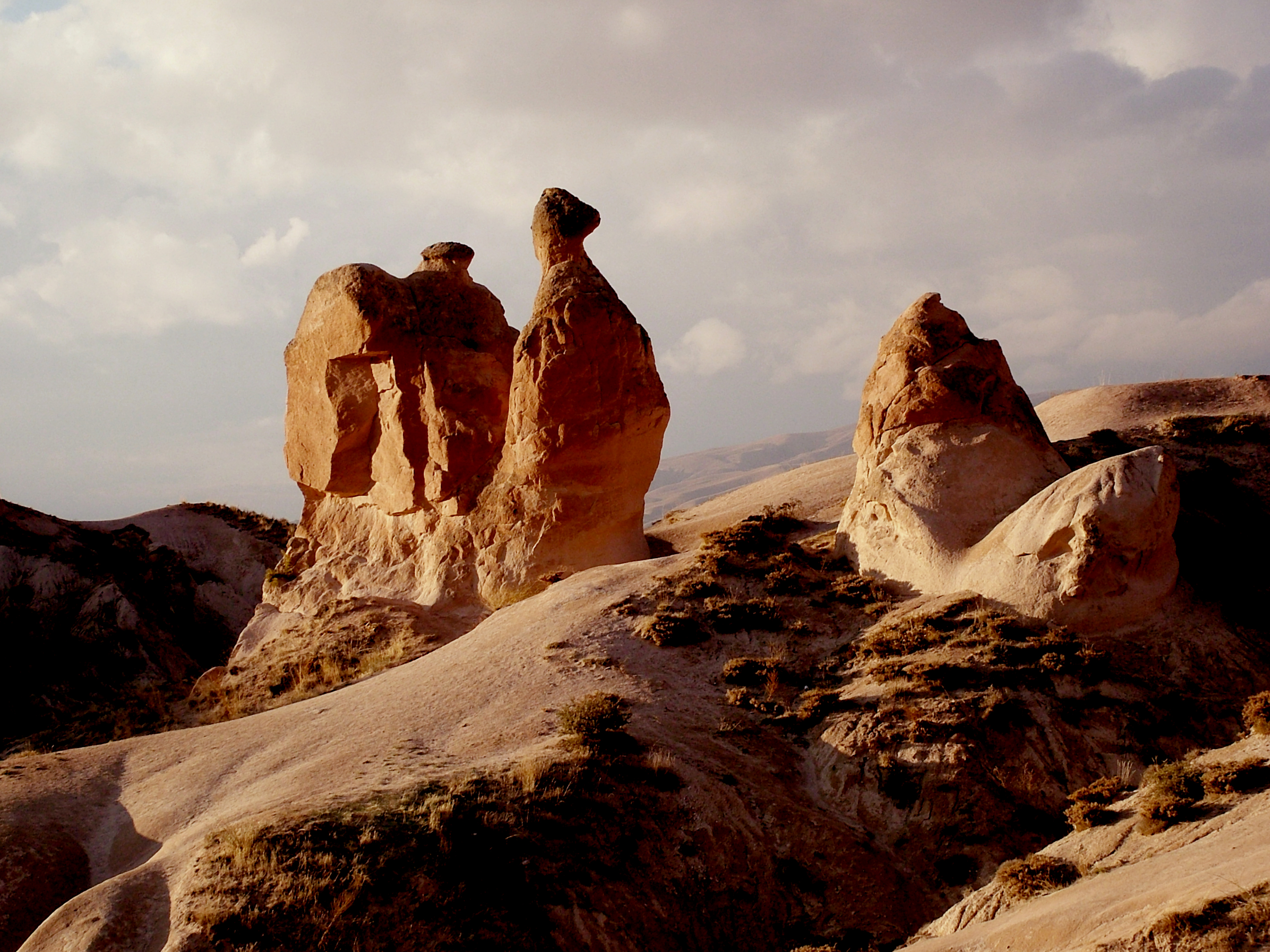 Kappadókia/Göreme Nemzeti Park (Törökország)